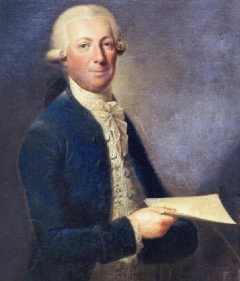 Jan Nepomuk Josef Buquoy (1741-1803), český botanik, filantrop a hrabě ze šlechtického rodu Buquoyů